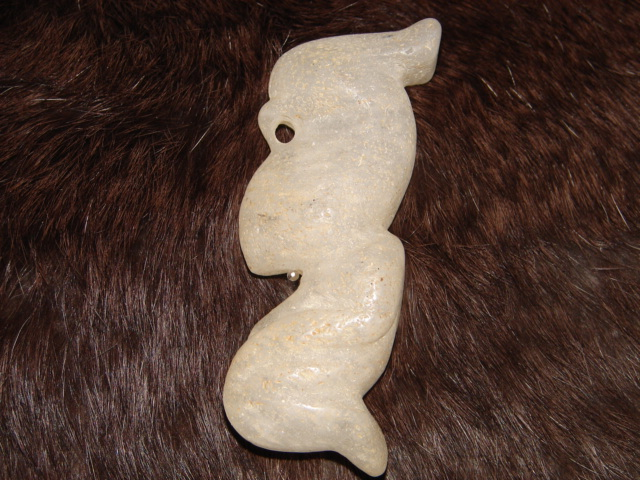 中文（台灣）: 器別：生坑 紋飾：立體 泌色：無 朝代：紅山文化 礦物學名：琉璃﹝二氧化硅﹞ 紅山文化-年代約3500-5000年。 紅山文化-小件配飾品.有數百種的造形.玉c形龍.猪龍.玉梟.玉鷹.面具三孔器.異獸.玉蟬複合體.太陽神等。 此器質化晶變‧次晶增生未受人工拋光打磨、 保留原有土咬風化的魚鱗狀的﹝六角柱狀晶體﹞ 、生坑未盤玩，三面立體﹝肖生﹞造形特別‧曲線流暢.雕工傳神‧創意佳。 ﹝藝術品﹞